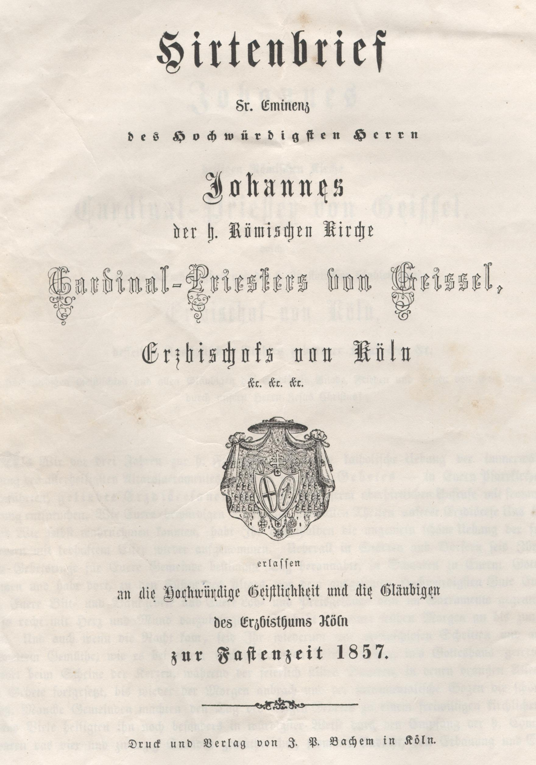 Johann Jakob Geisel, Bischof von Speyer, Kardinalbischof von Köln